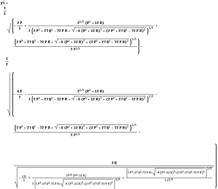 jedno z řešení kvartické rovnice